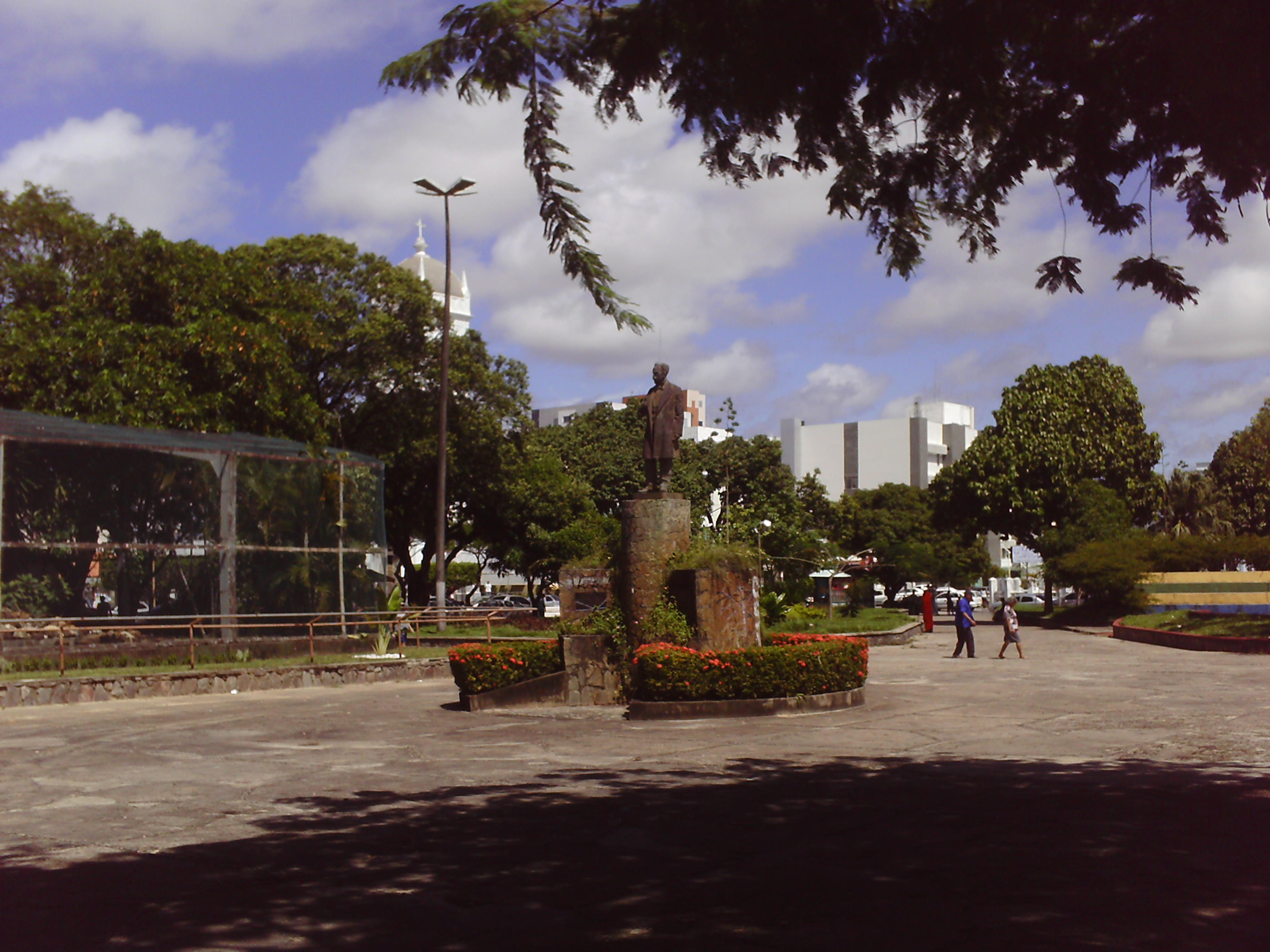 Praça Tobias Barreto